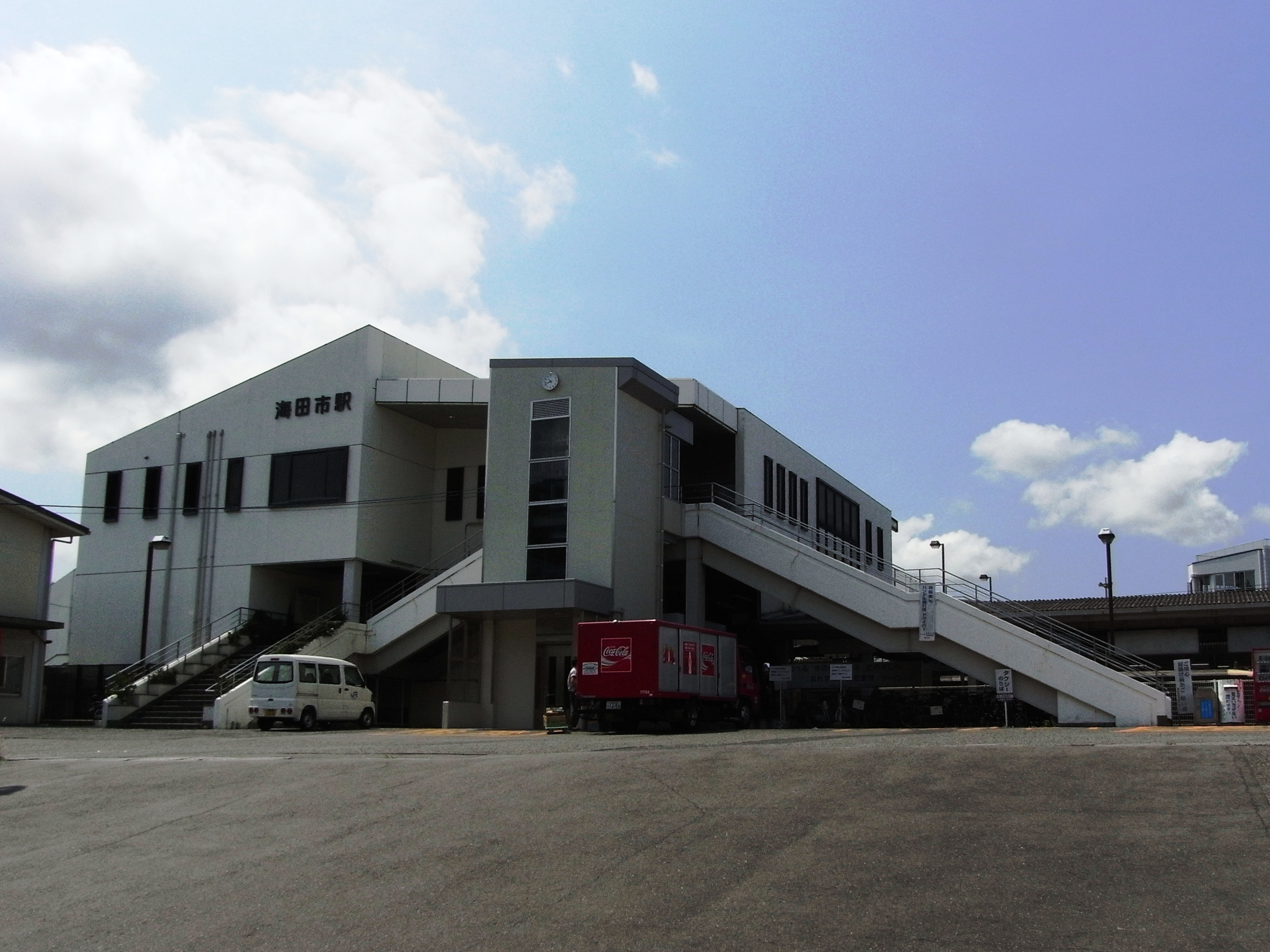 海田市駅駅舎